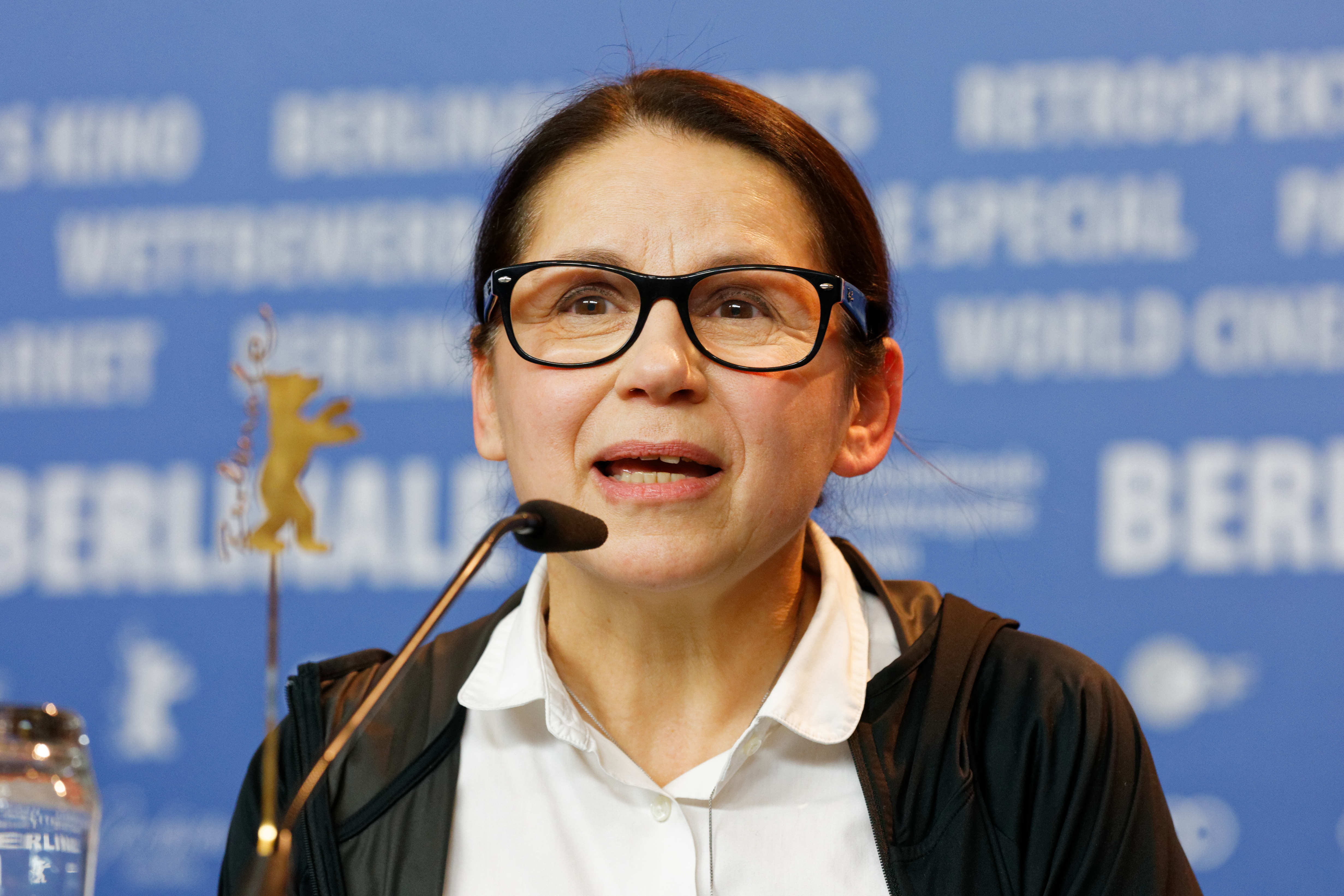 Ildikó Enyedi bei der Pressekonferenz zu Testről és lélekről (On Body and Soul) zur Berlinale 2017